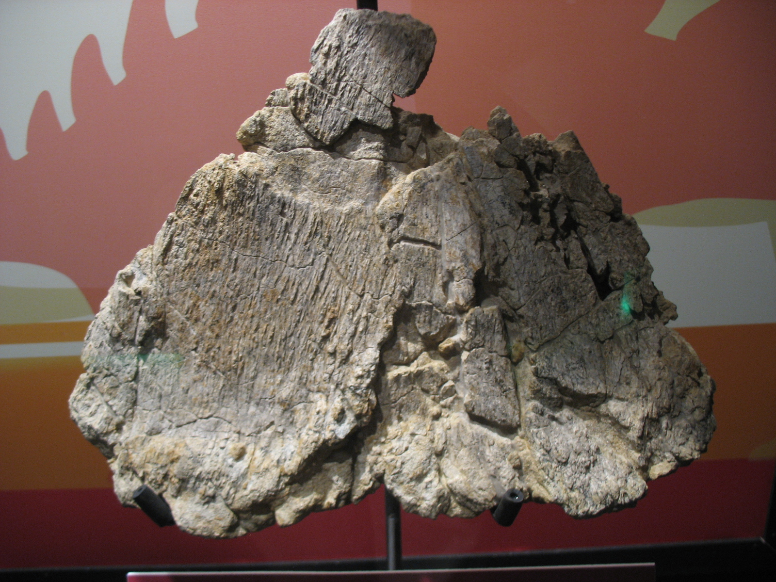 Placa dérmica de Dacentrurus. Yacimiento Barrihonda- El Humero (Riodeva, Teruel, España). Expuesto en el museo paleontológico de Dinópolis.